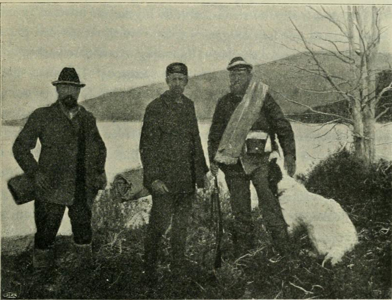 Quensel, Carl Skottsberg och Albert Pagels. Bild på sidan 65 i Båtfärder och vildmarksridter : minnen från en forskningsfärd genom Patagonien och Eldslandet.